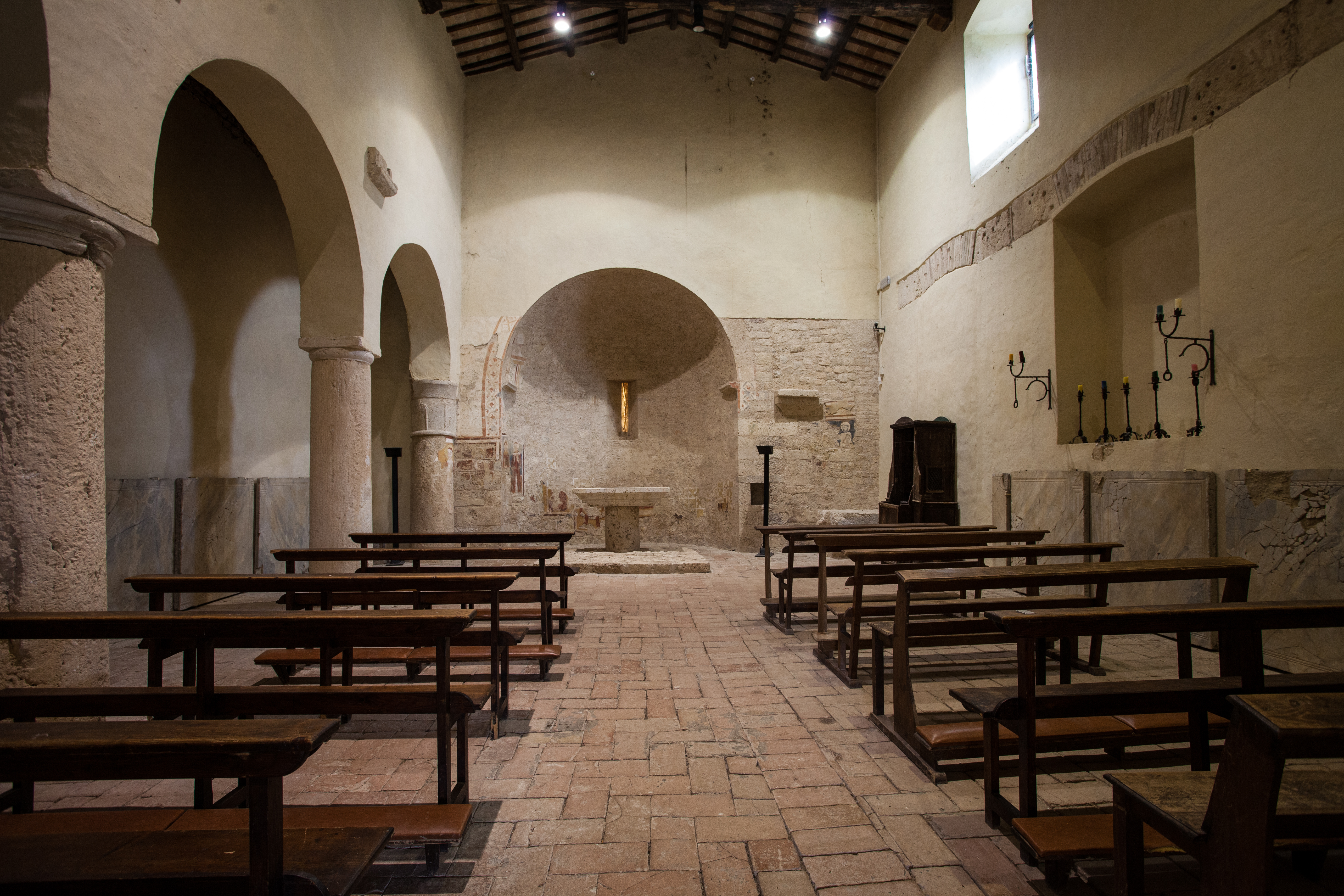 Area Archeologica di Carsulae - MIBAC This is a photo of a monument which is part of cultural heritage of Italy.